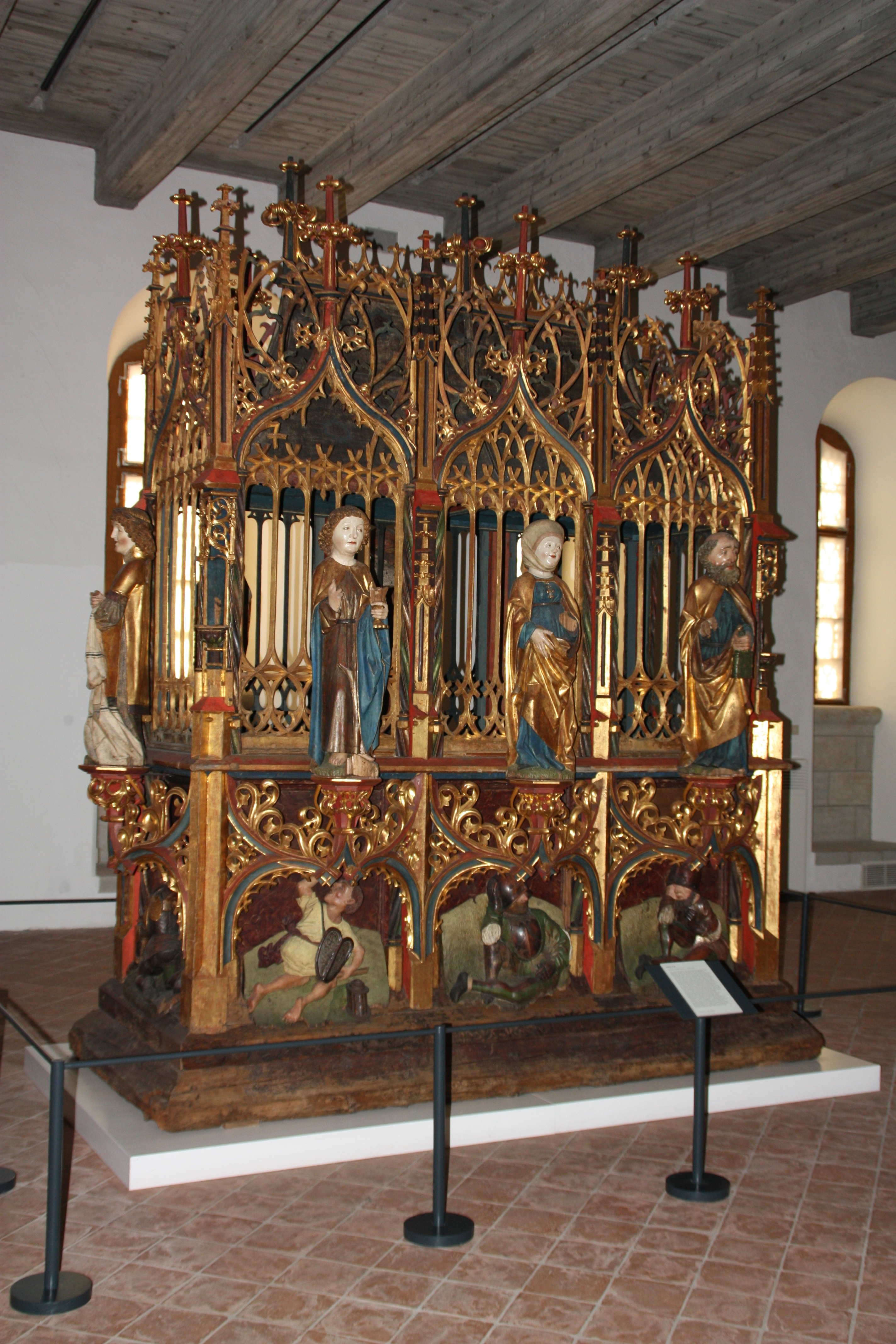 Schloßbergmuseum Chemnitz. Heiliges Grab, ehemals in der Jakobikirche Chemnitz.